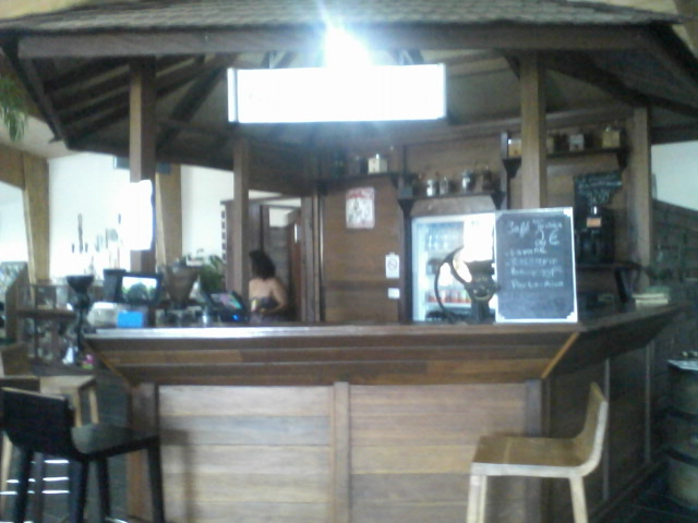 Permet de déguster divers café et des cocktails frais